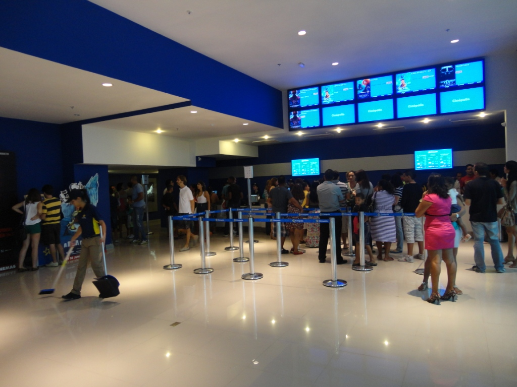 Bilheteria do Cinépolis do Shopping Bela Vista de Salvador, BA